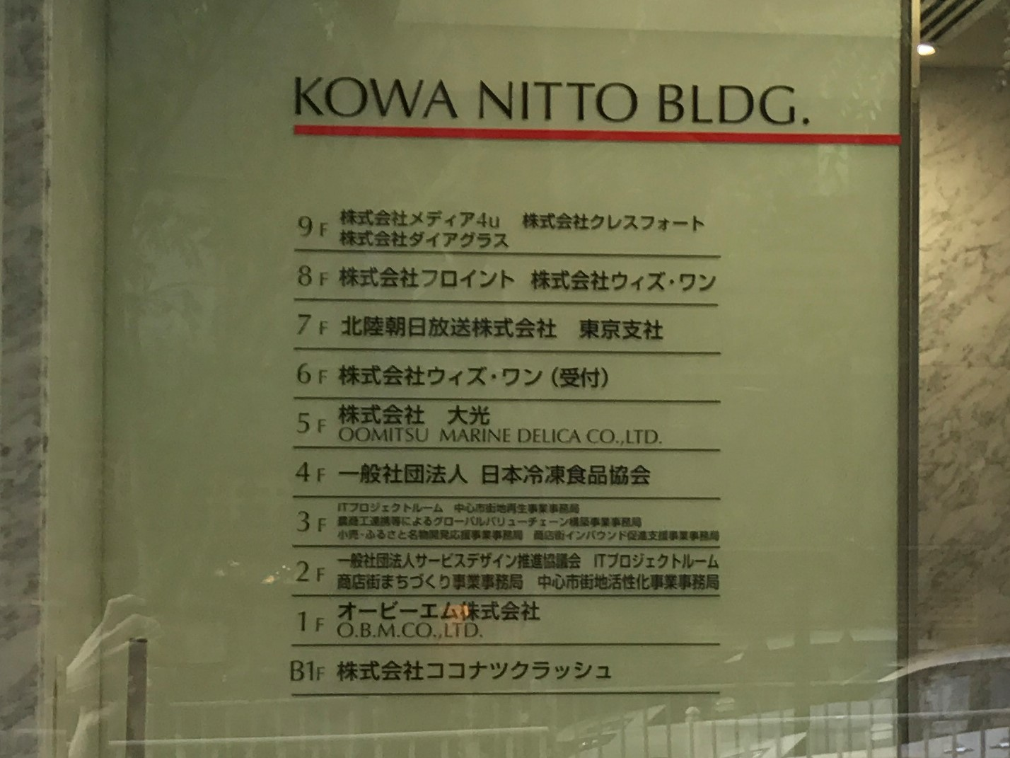 興和日東ビル入居者